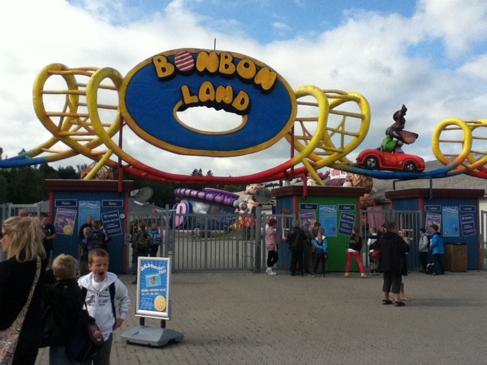 BonBon-Lands indgang.